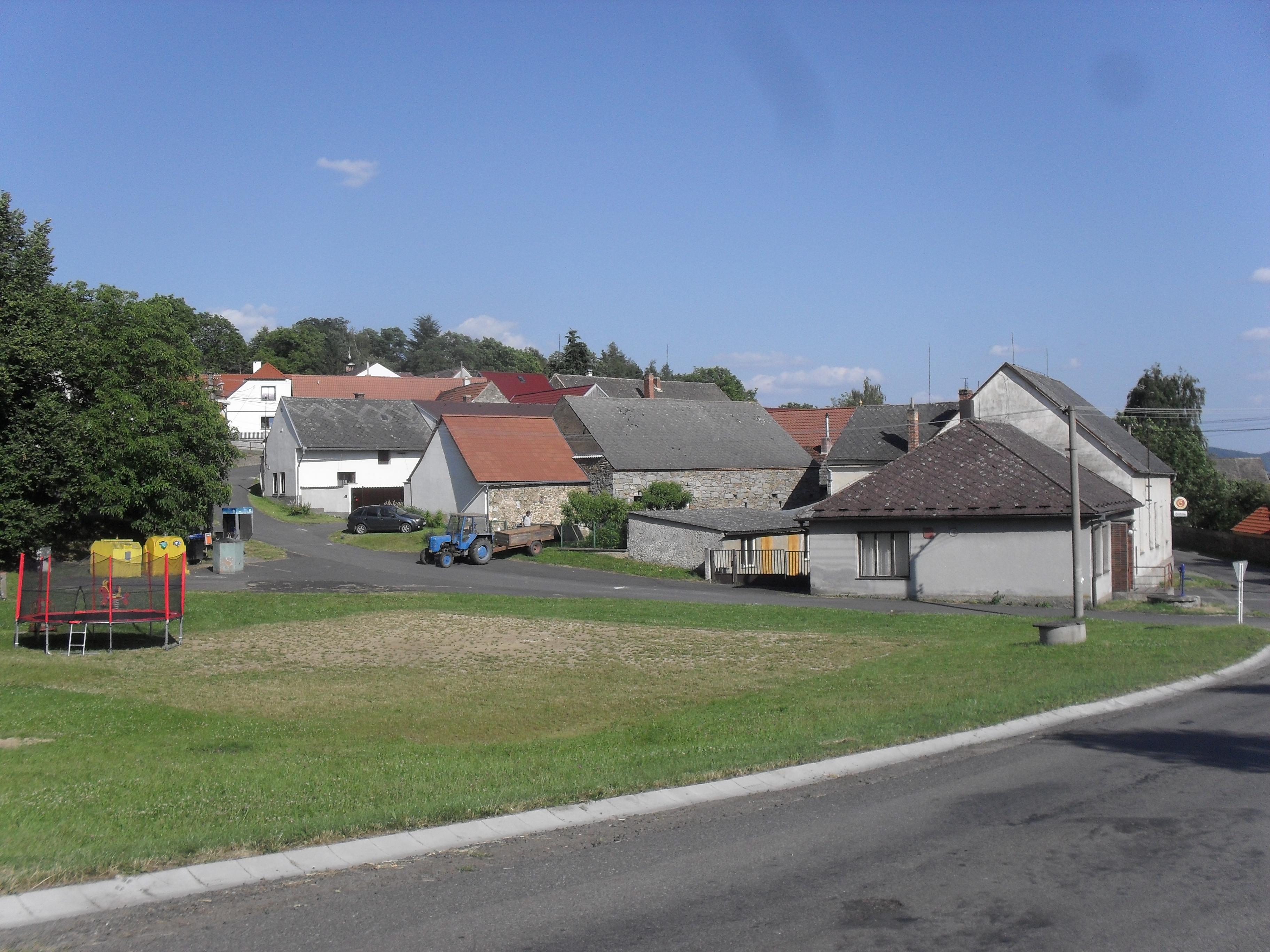 Fotografie pořízená v obci Břežany, poblíž Pačejova (Klatovsko). V obci je velký počet památkově chráněných domů.